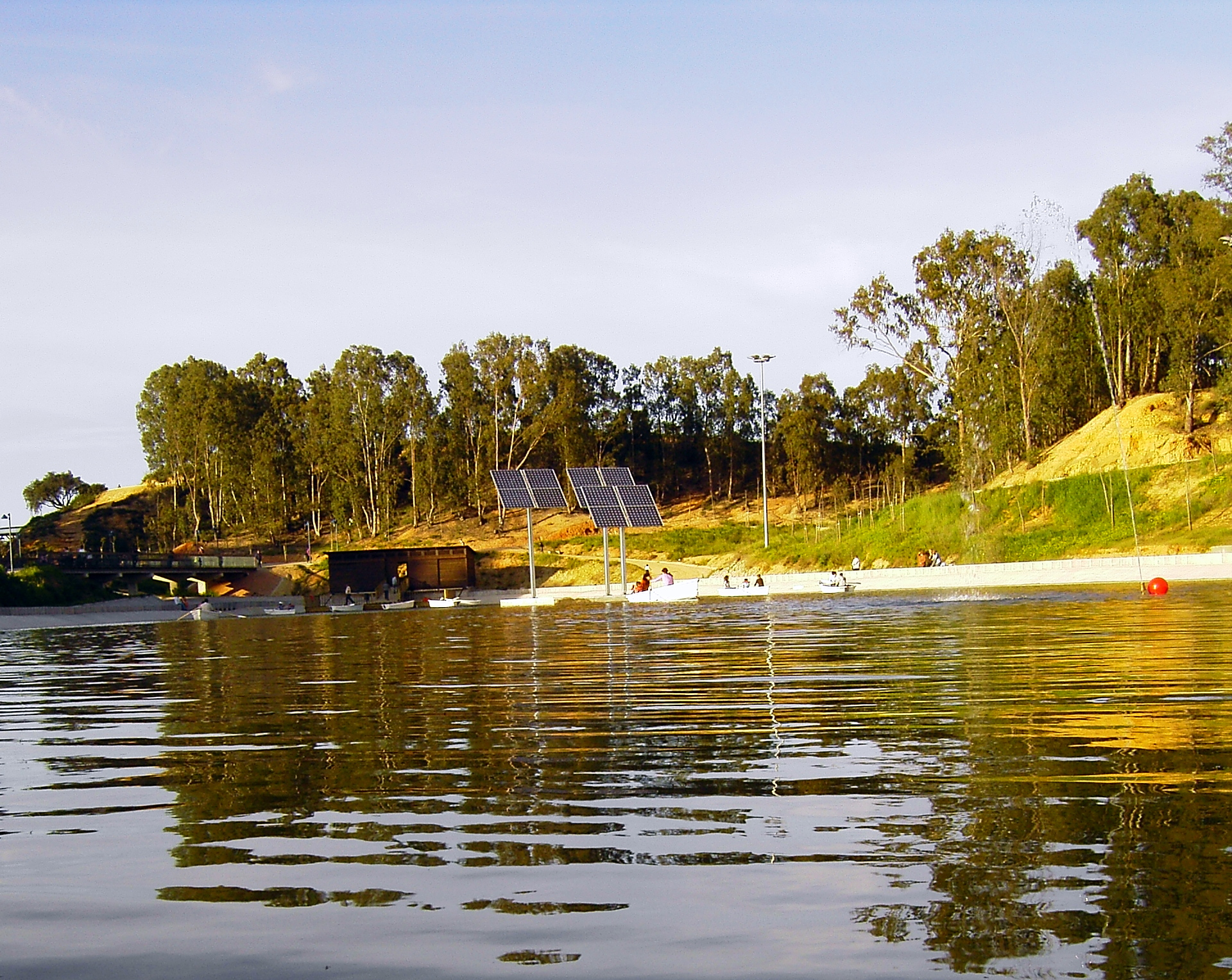 Parque Moret Huelva, lago